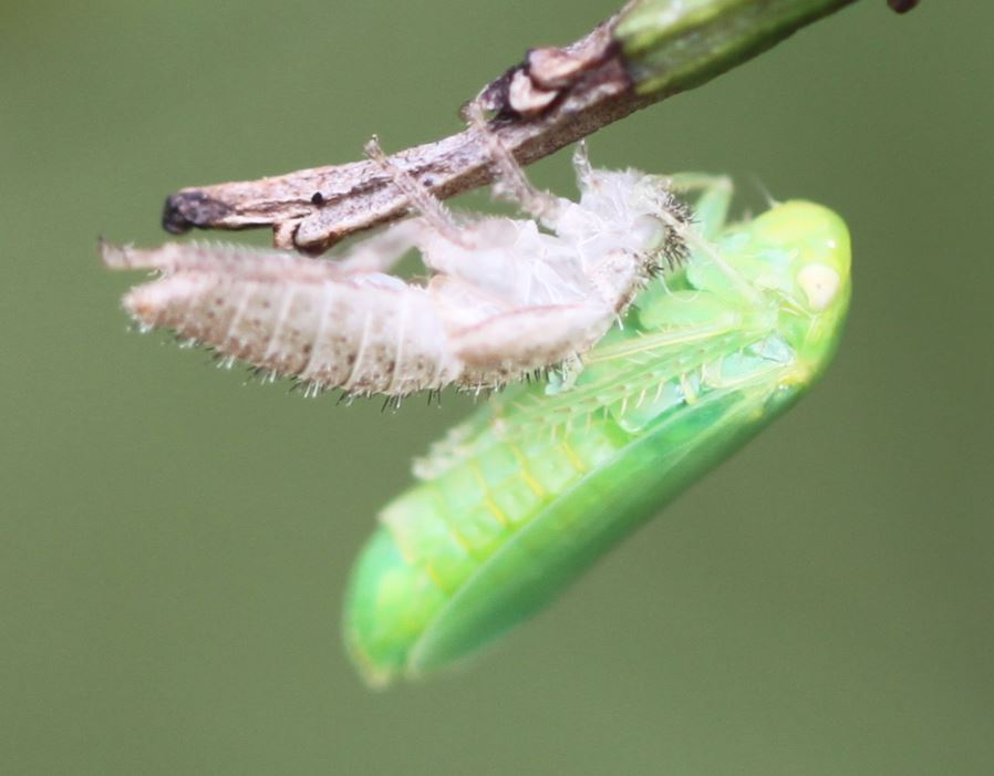 Ginsterlederzikade (Batracomorphus allionii) unmittelbar nach der letzten Häutung an Besenginster; daneben die Exuvie; am 14. Juni 2018 in der Schwetzinger Hardt